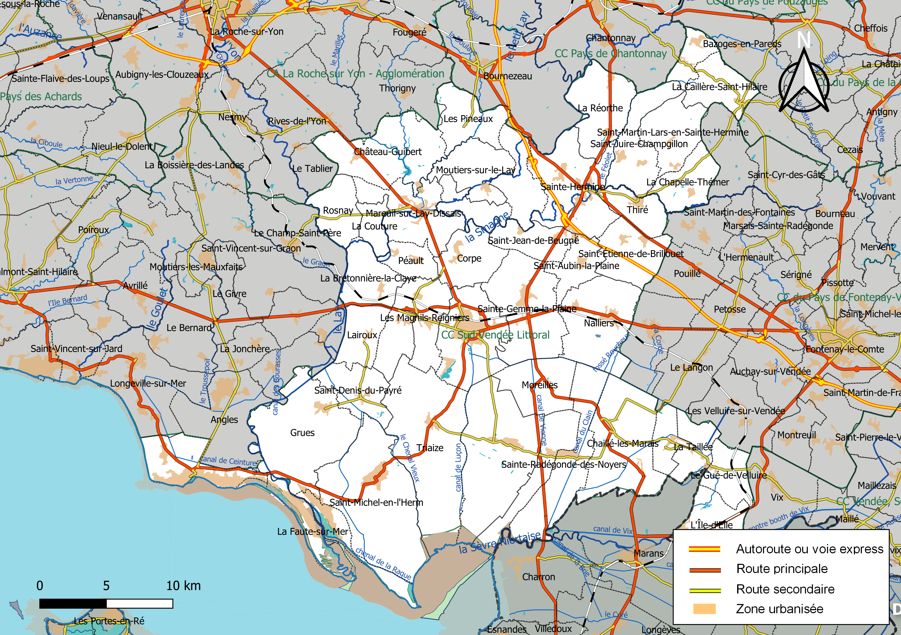 Carte géographique de la Communauté de communes Sud Vendée Littoral, département de la Vendée, France. Composition au 1er janvier 2019.